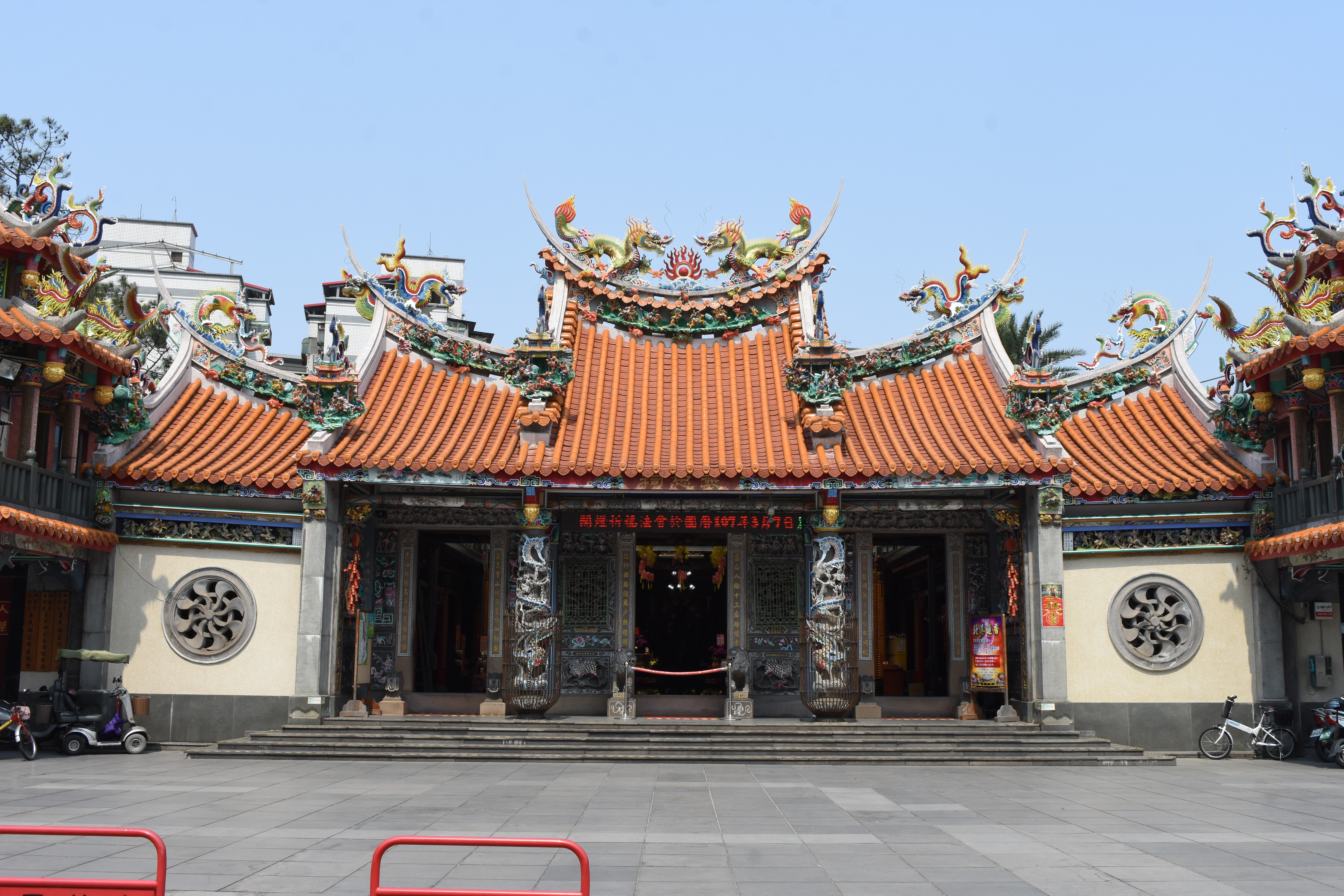 中文（台灣）: 平鎮義民亭1